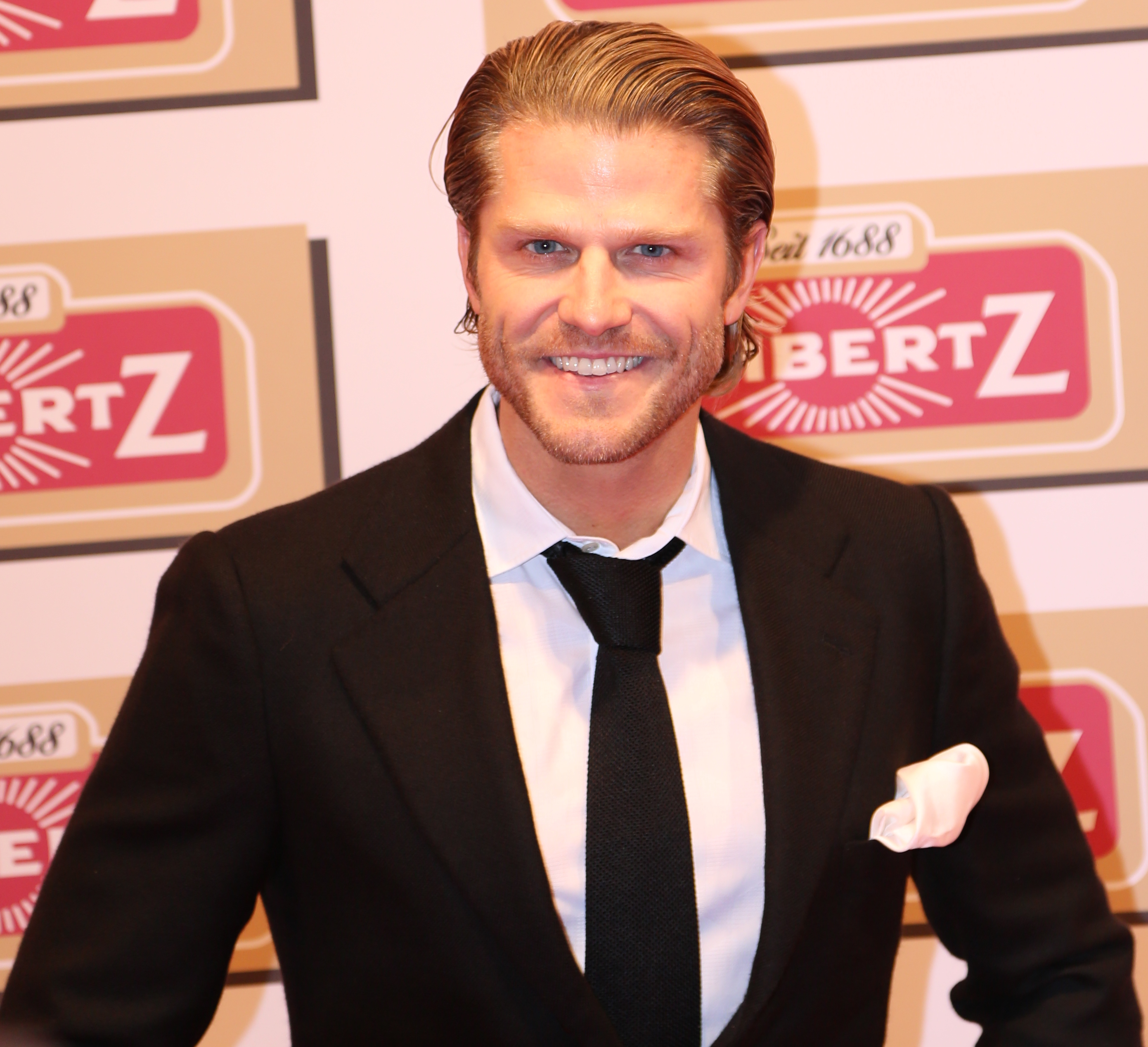 Paul Janke bei der Lambertz Monday Night 2017.